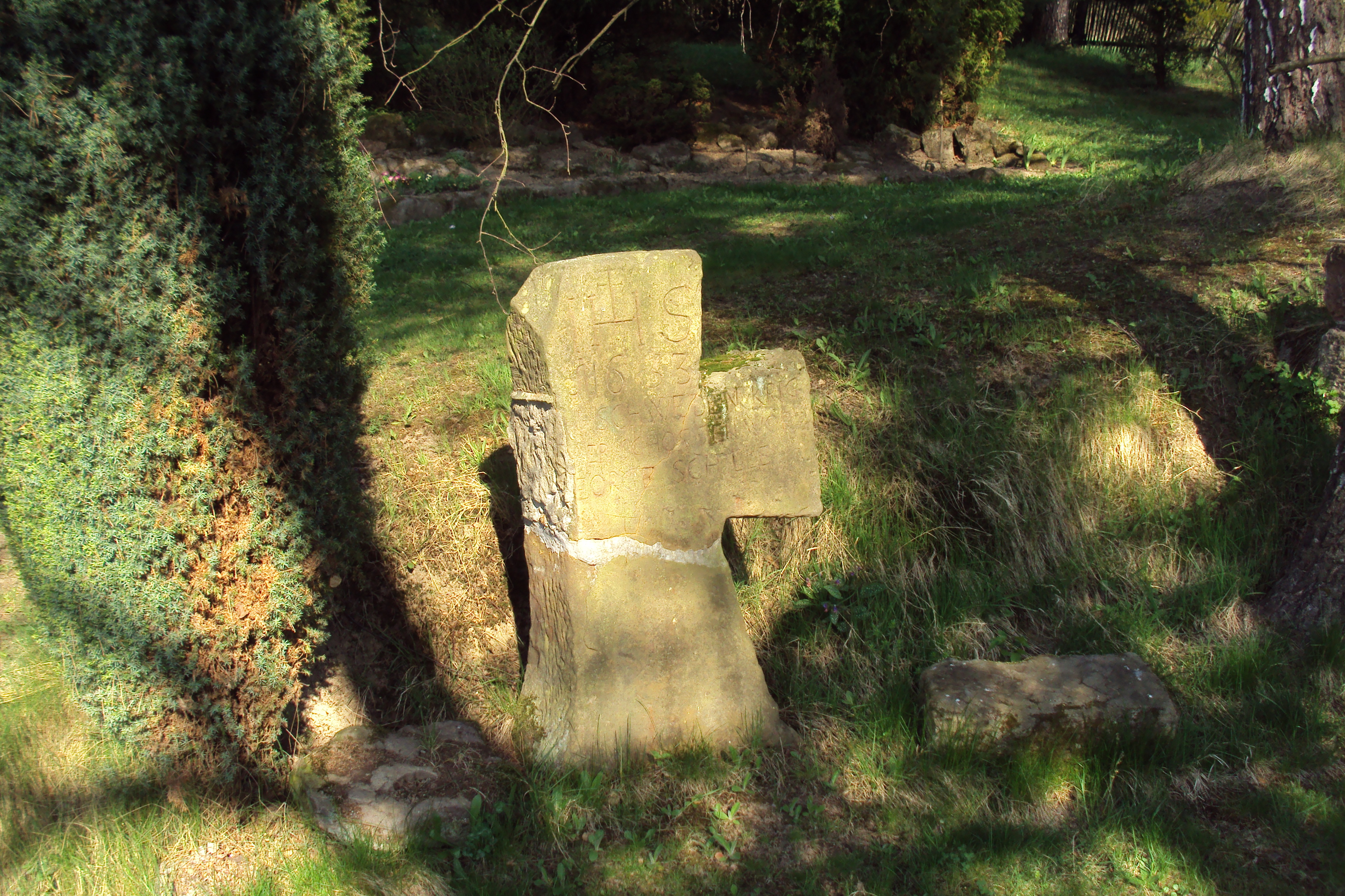 Smírčí kříž ve Velenicích, nyní u stavení čp.19